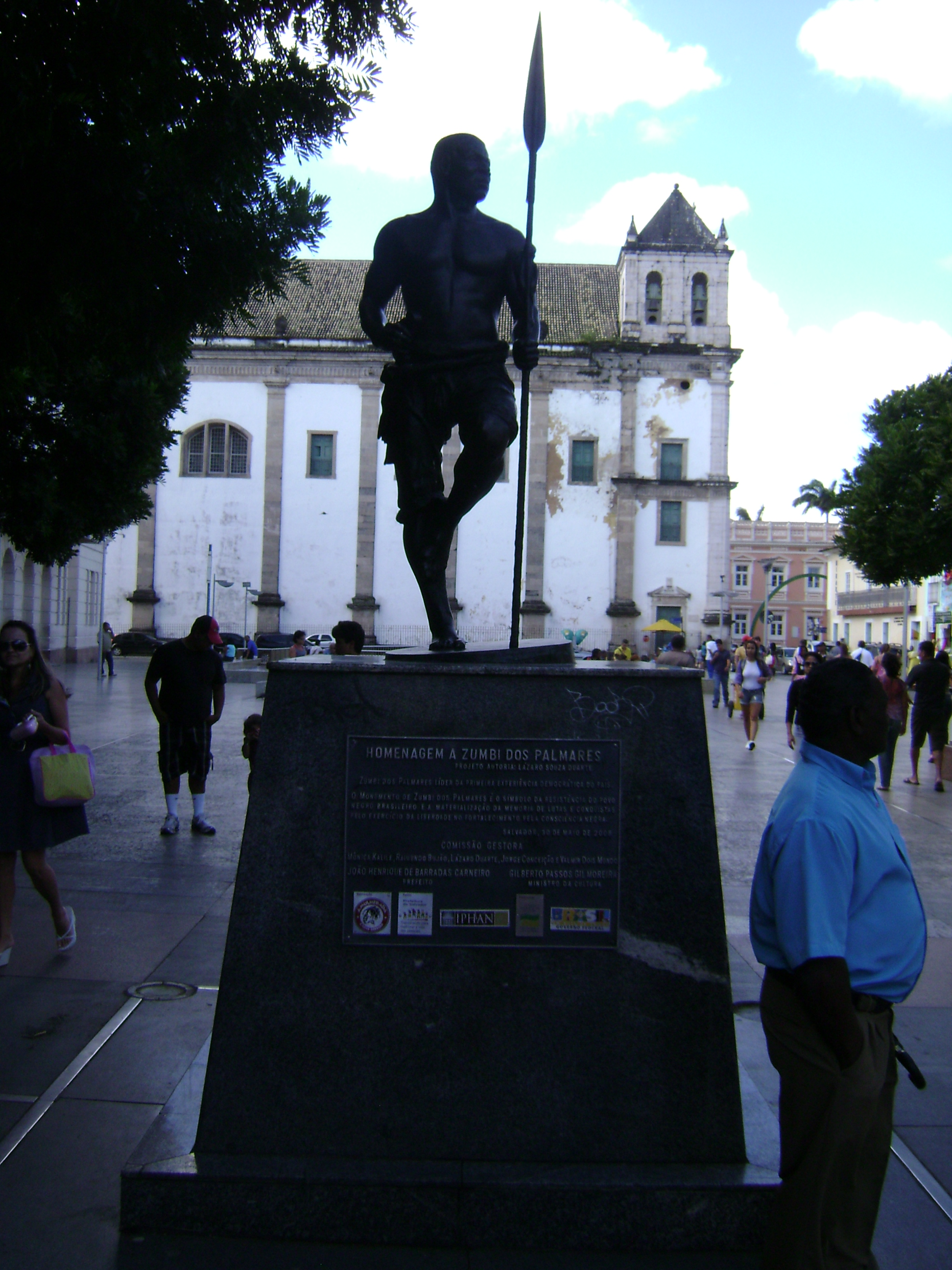 Monumento ao Zumbi dos Palmares em Salvador, Bahia, Brasil.